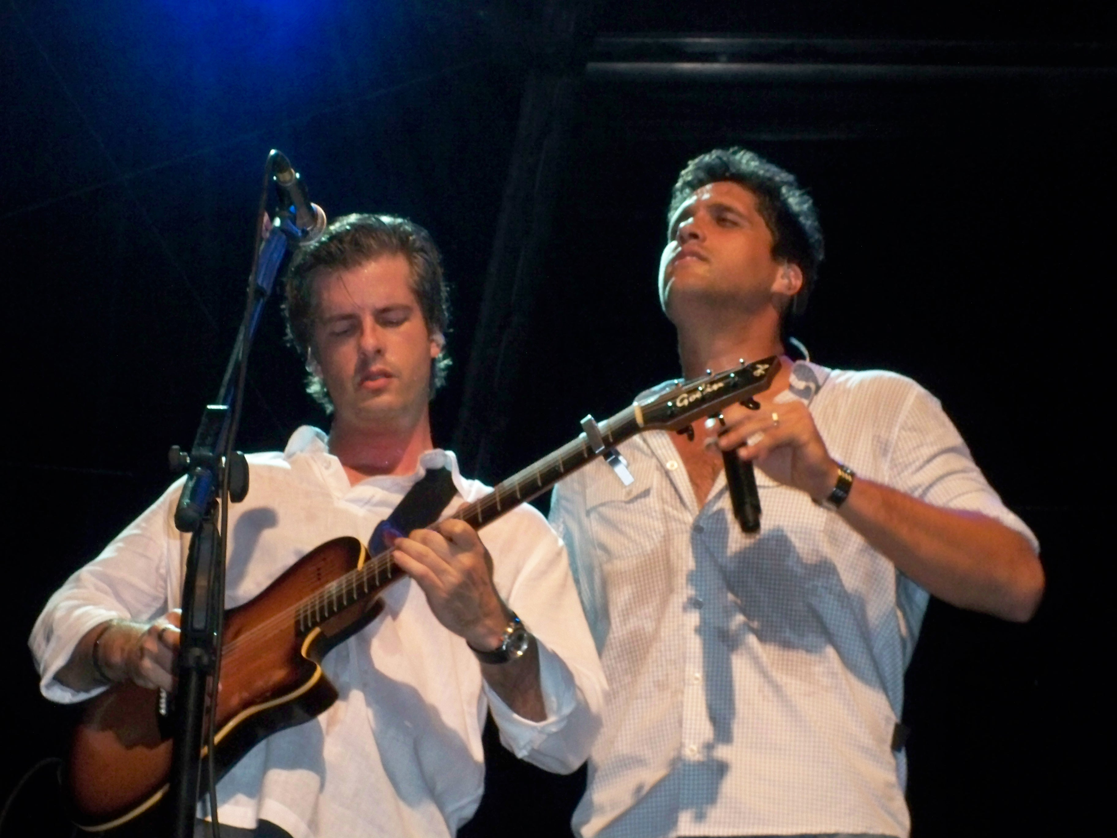 A dupla sertaneja Victor & Leo, durante concerto na cidade de Boa Vista, Roraima.